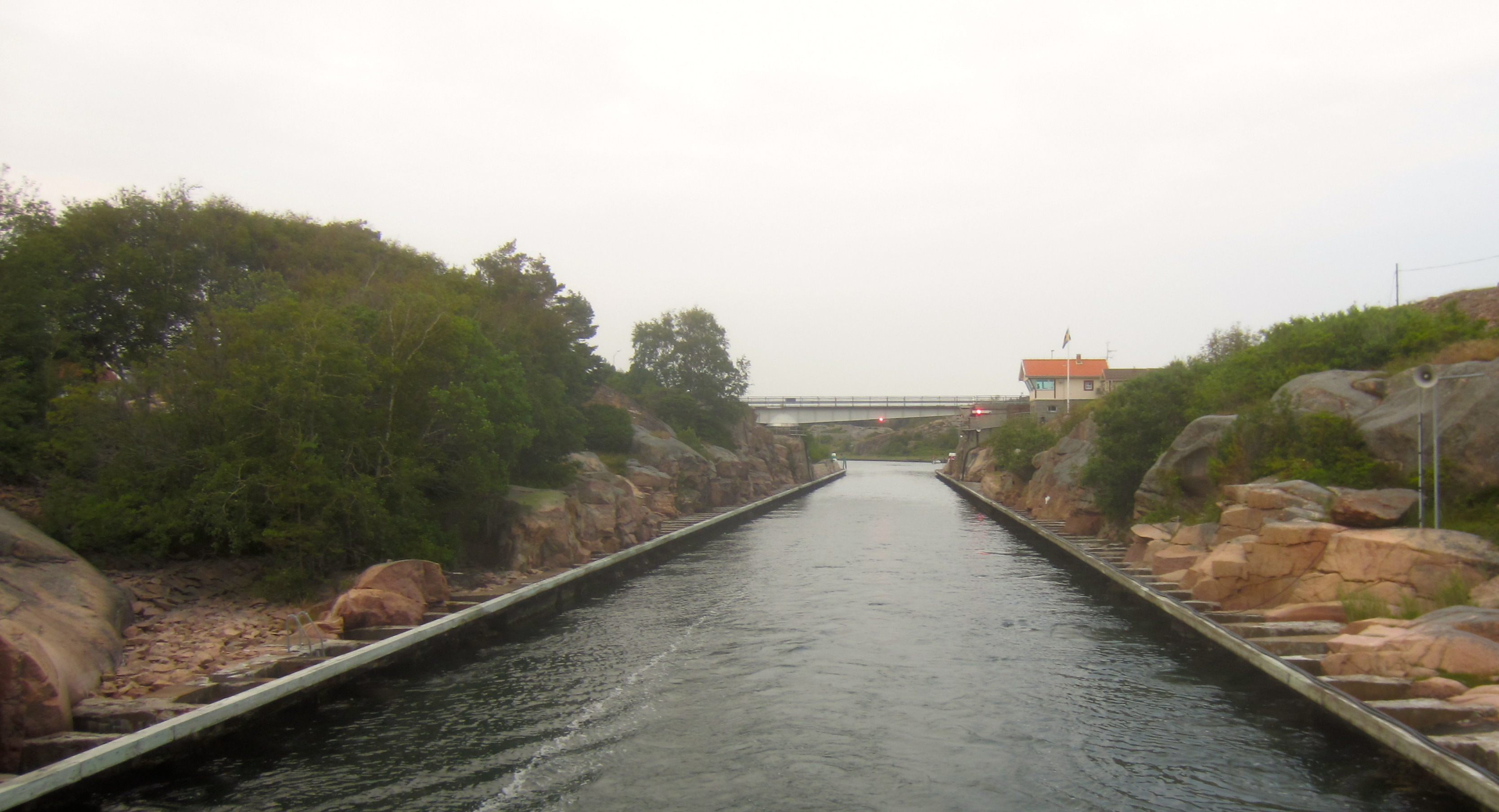 Sotekanalen, 2015